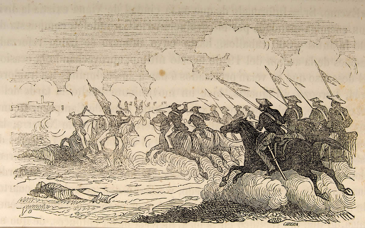 Esquadrons de llancers carlins ataquen als caçadors de la Guàrdia liberal a Viana